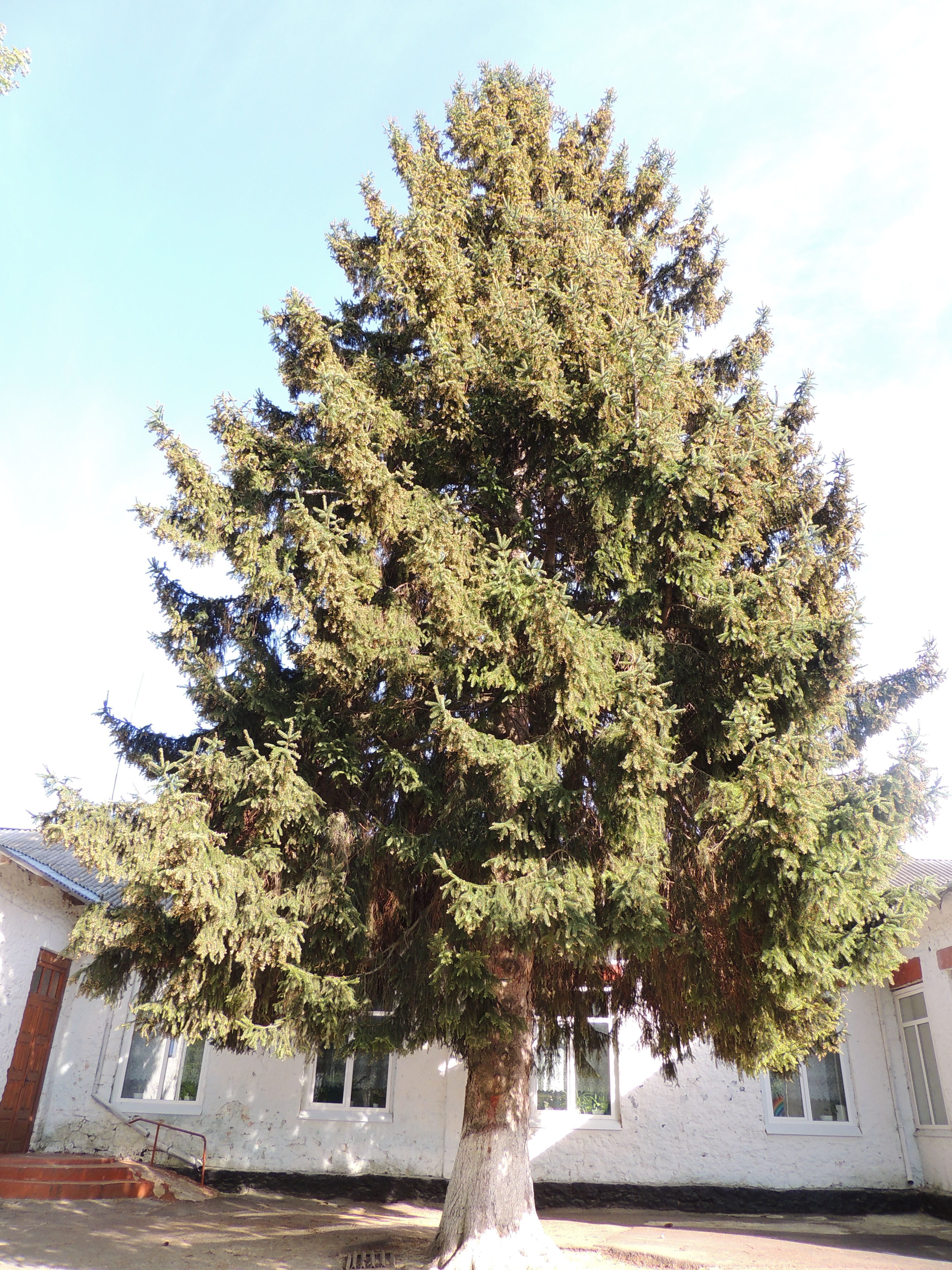 Це фото.